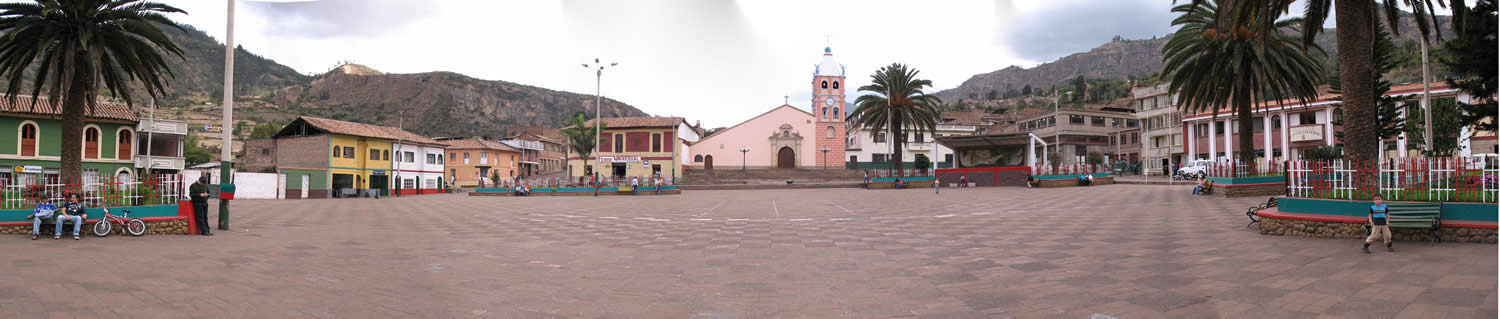 Panoramica Plaza Principal Paz de Río Boyaca Colombia.